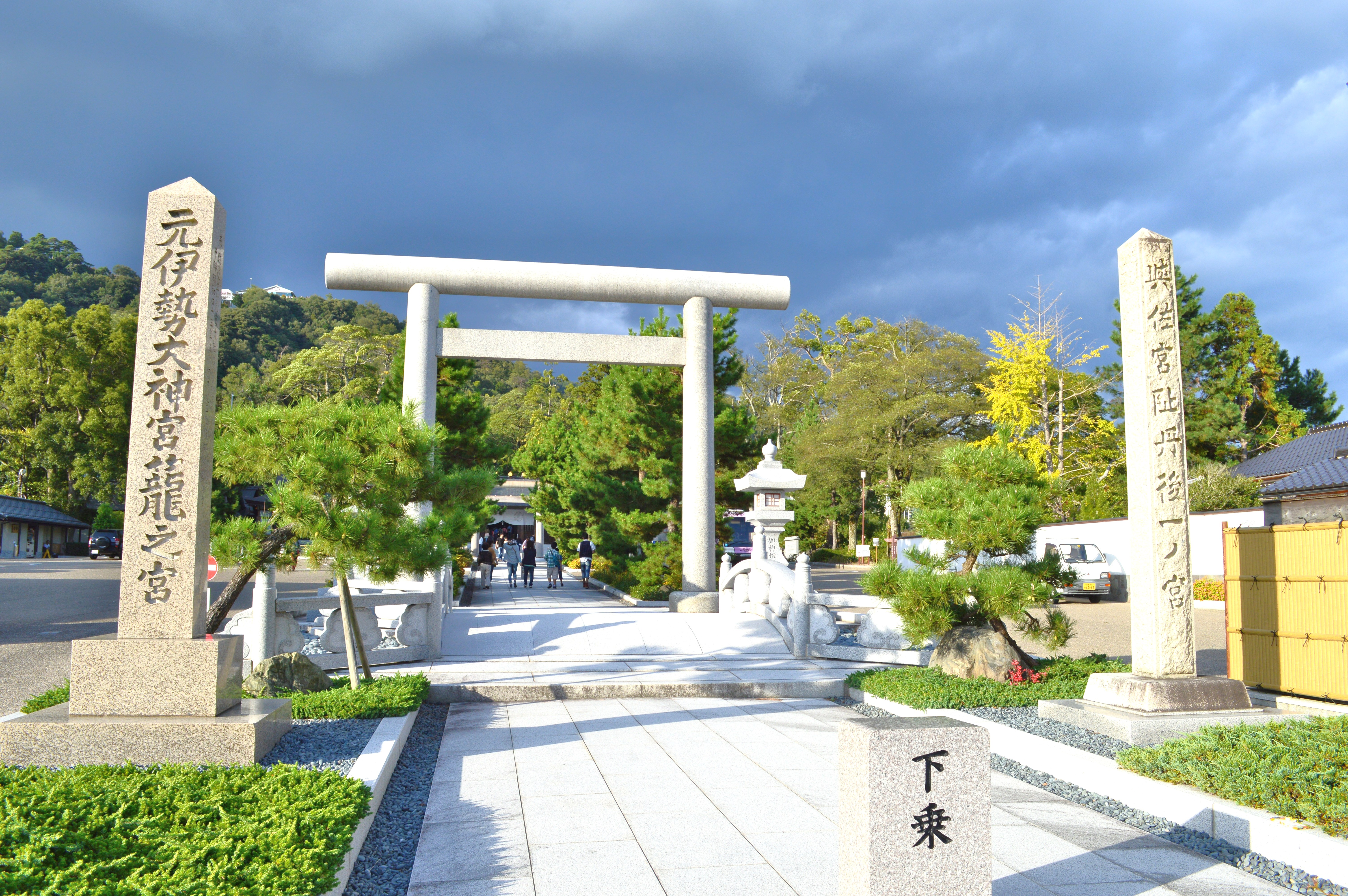 籠神社 大鳥居